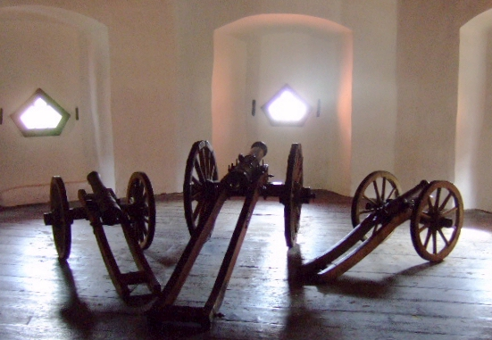 Burg Pfalzgrafenstein - Geschütze